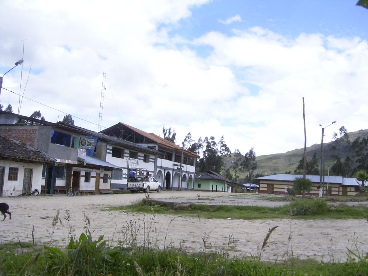 Municipalidad de Molinopampa, Chachapoyas, Amazonas, Peru.